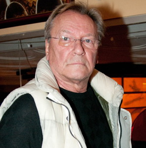 Сергей Шакуров на премьере фильма «Не скажу».